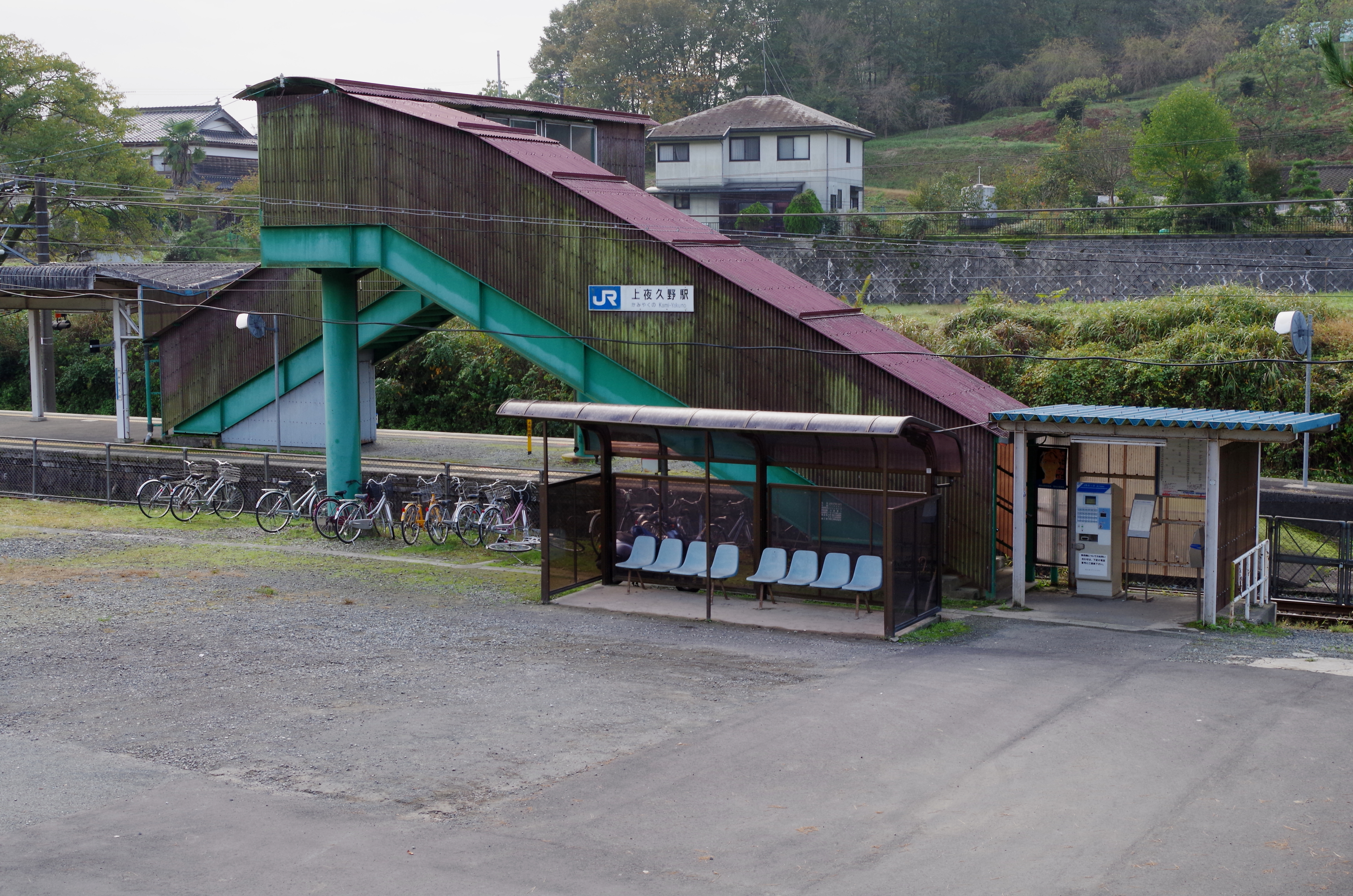 JR西日本 山陰本線 上夜久野駅